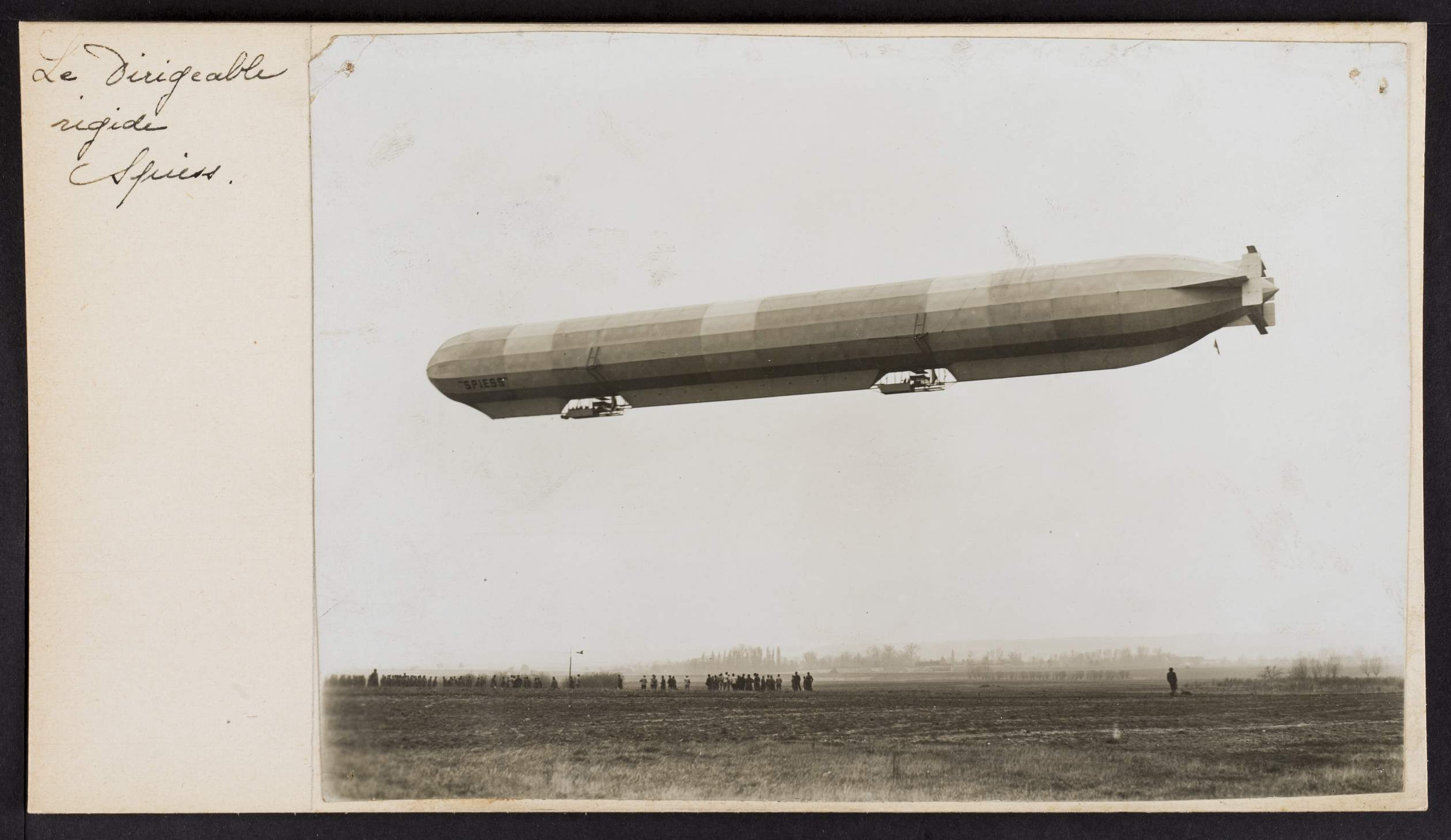 Le dirigeable « Spiess ».